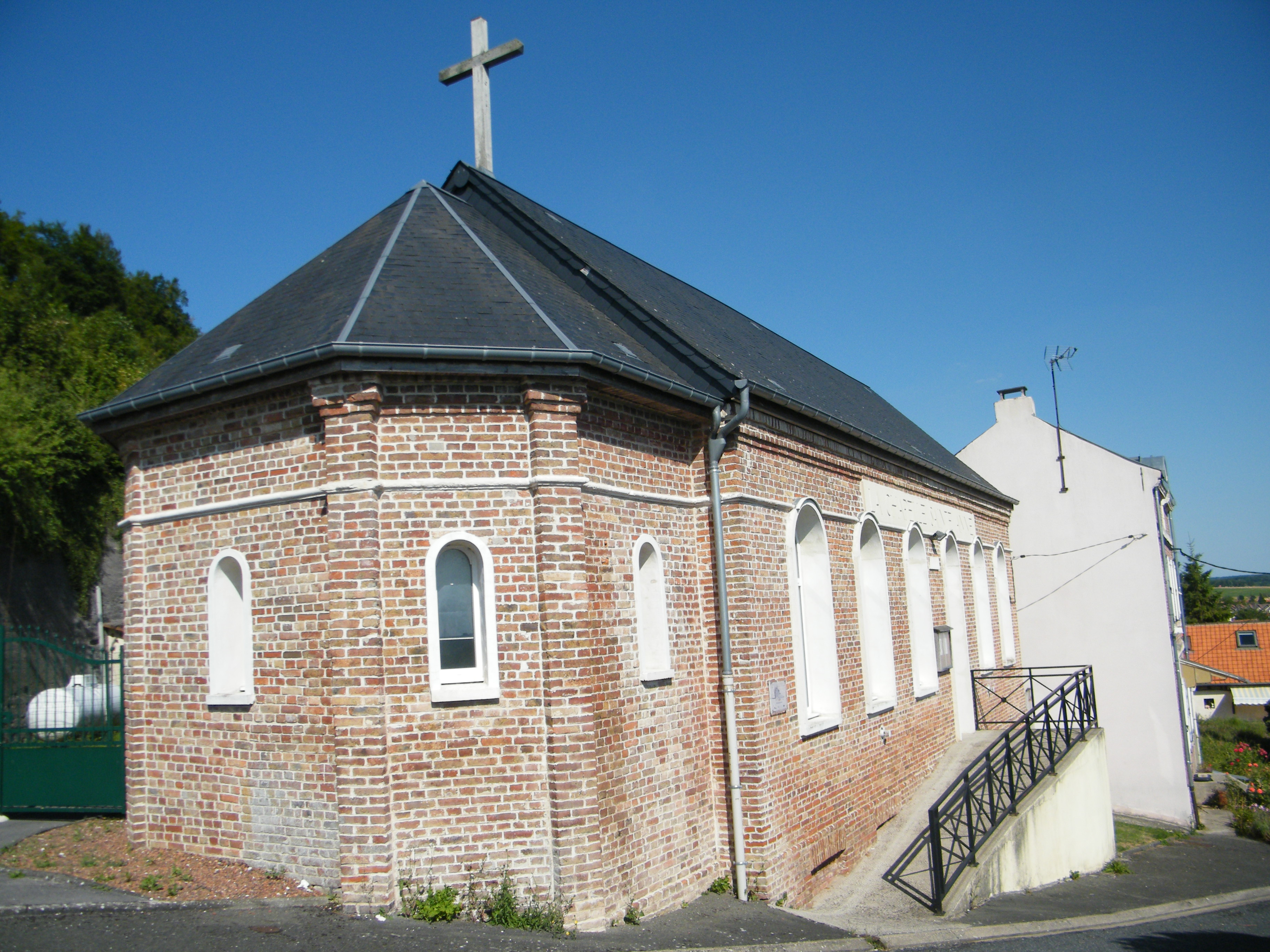 L'Etoile (Somme, Fr), chapelle Sainte-Anne.